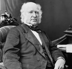 Hon. John Robertson, Senator.